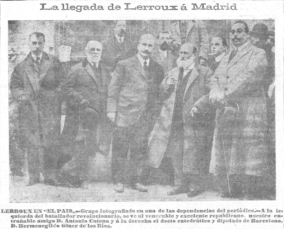 Llegada de Lerroux a Madrid.